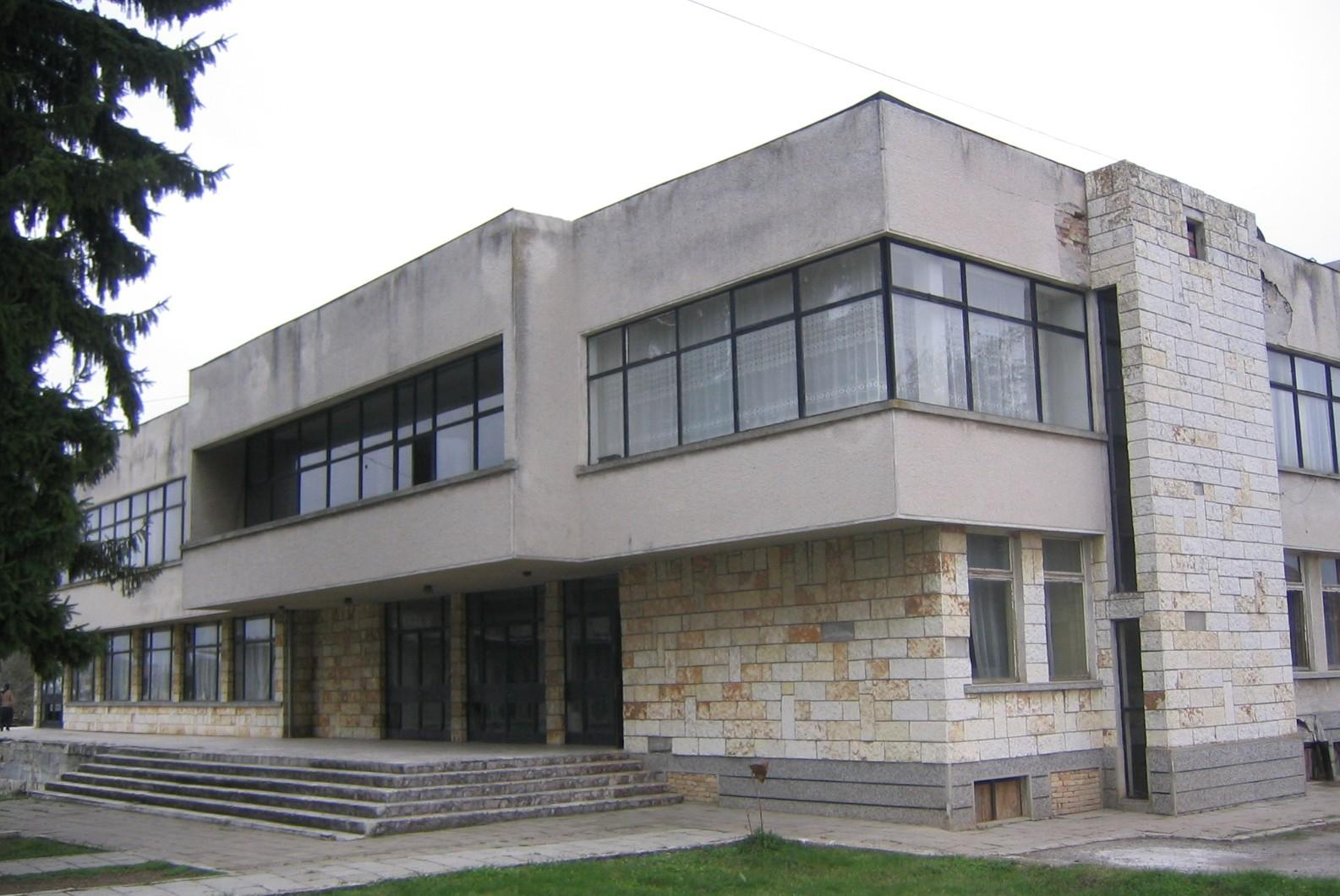 Снимка на читалищната сграда в село Ломци, Поповско.